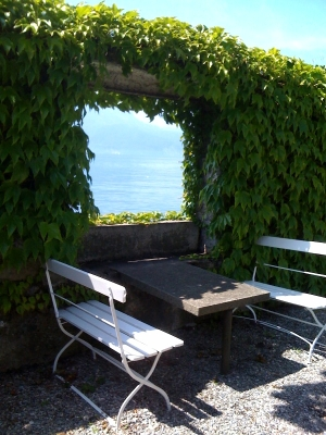 Ouverture dans le mur de la "salle de verdure" à la Villa Le Lac de Le Corbusier à Corseaux (Suisse).